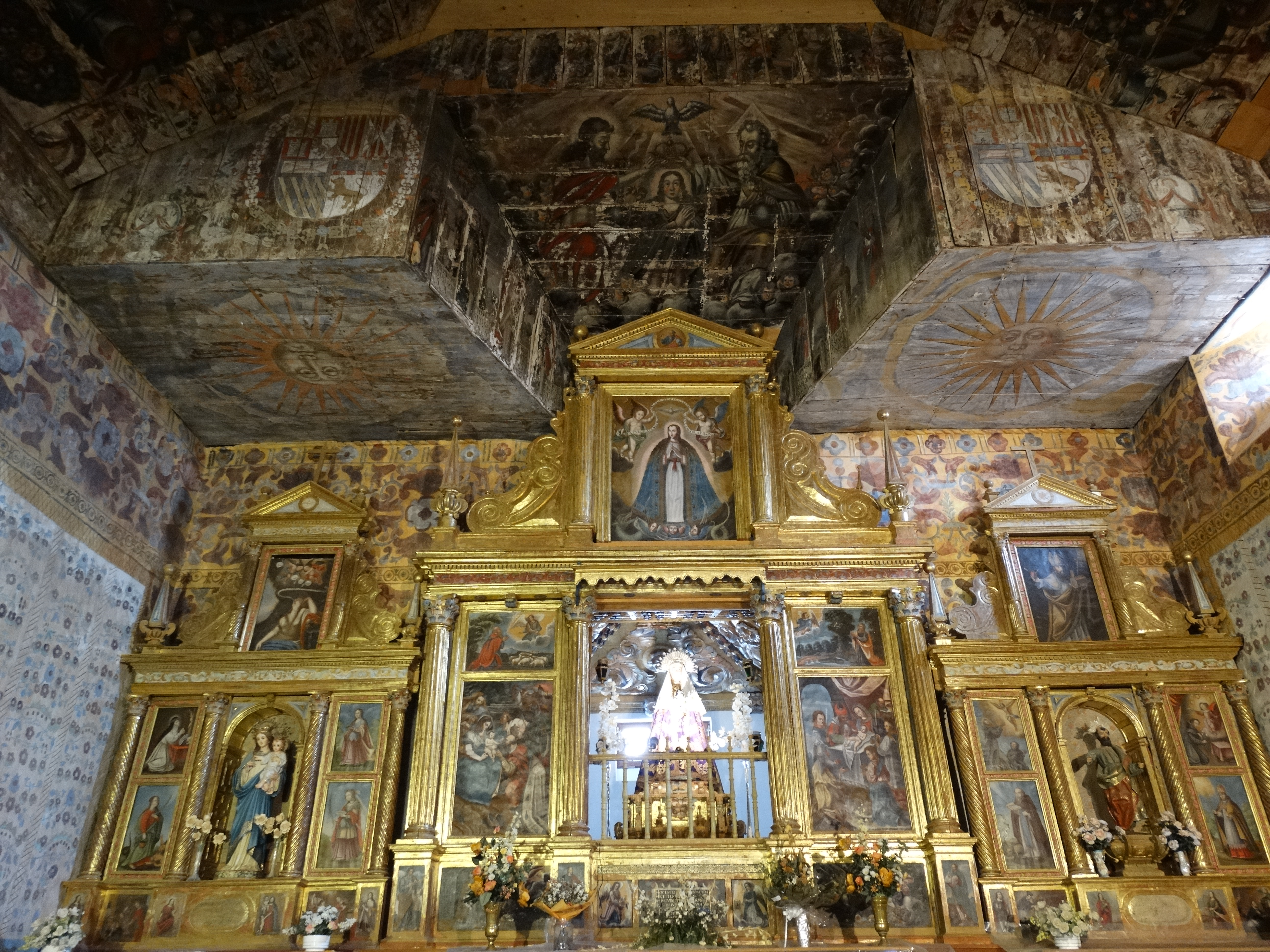 Pozuelo de la Orden, provincia de Valladolid, España. Ermita de Santa Ana, edificio con un artesonado mudéjar de gran valor y pinturas del siglo XVII recuperadas en la última restauración. Está catalogado como BIC. Altar y retablo mayor del primer tercio del siglo XVII. Se ven pintados los escudos del rey Felipe IV y las representaciones del sol levante (a la derecha) y el sol poniente (a la izquierda).